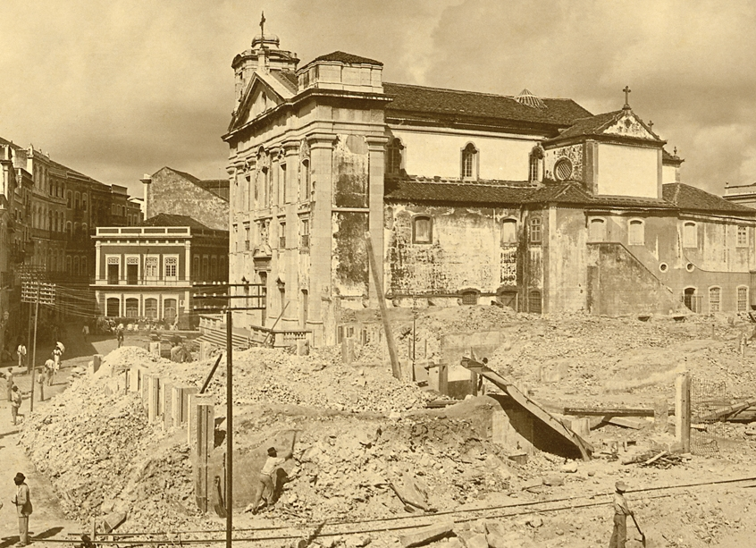 Trabalhos de demolição do Largo e Igreja do Corpo Santo no Recife (capital do estado brasileiro de Pernambuco) em 1913.